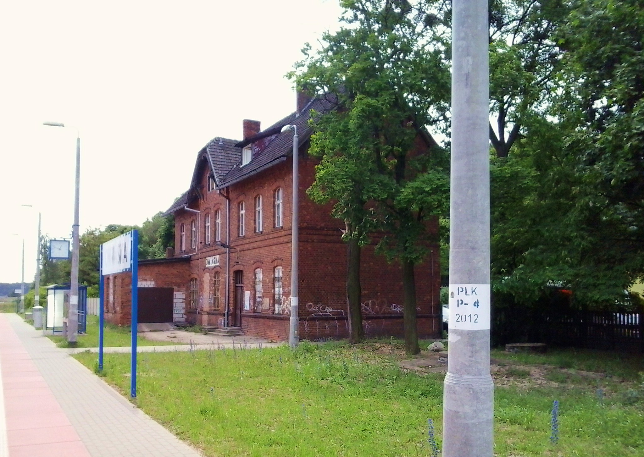 Owińska, dworzec kolejowy.